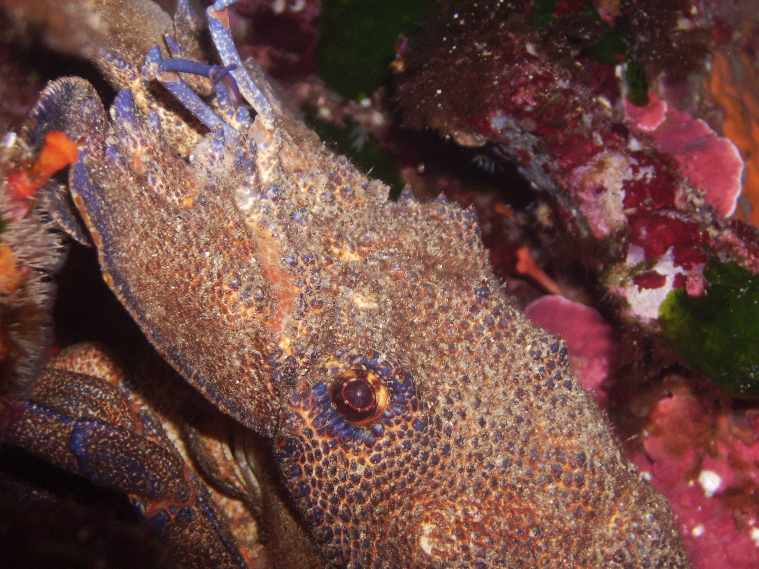 Bärenkrebs Gozo